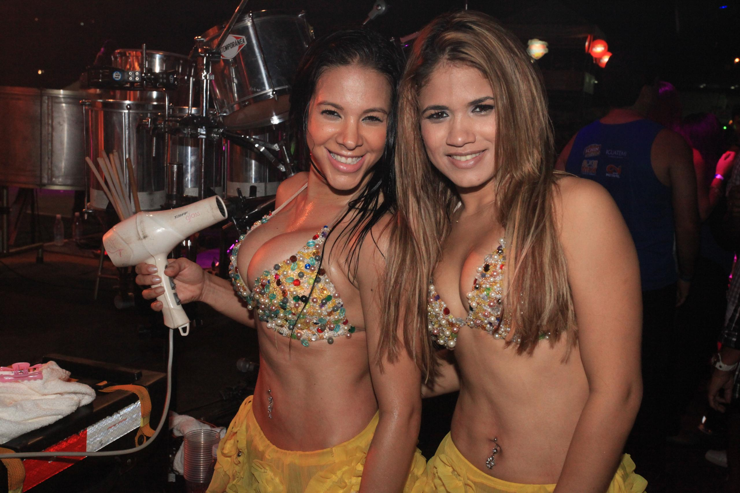 A cantora Ivete Sangalo canta no Arraia do Cerveja & Cia em Santo Antônio de Jesus no interior da Bahia. O marido da cantora Daniel Cady marca presença no show da esposa acompanhado de sua mae No camarim a Cantora Ivete Sangalo brincou com a vocalista da Banda Aviões do Forró colocando o veu de noivinha na mesma.Solange esta de casamento marcado para o mês de setembro deste ano. Ivete sera a madrinha do casamento A dupla Jorge & Mateus encerrou a noite